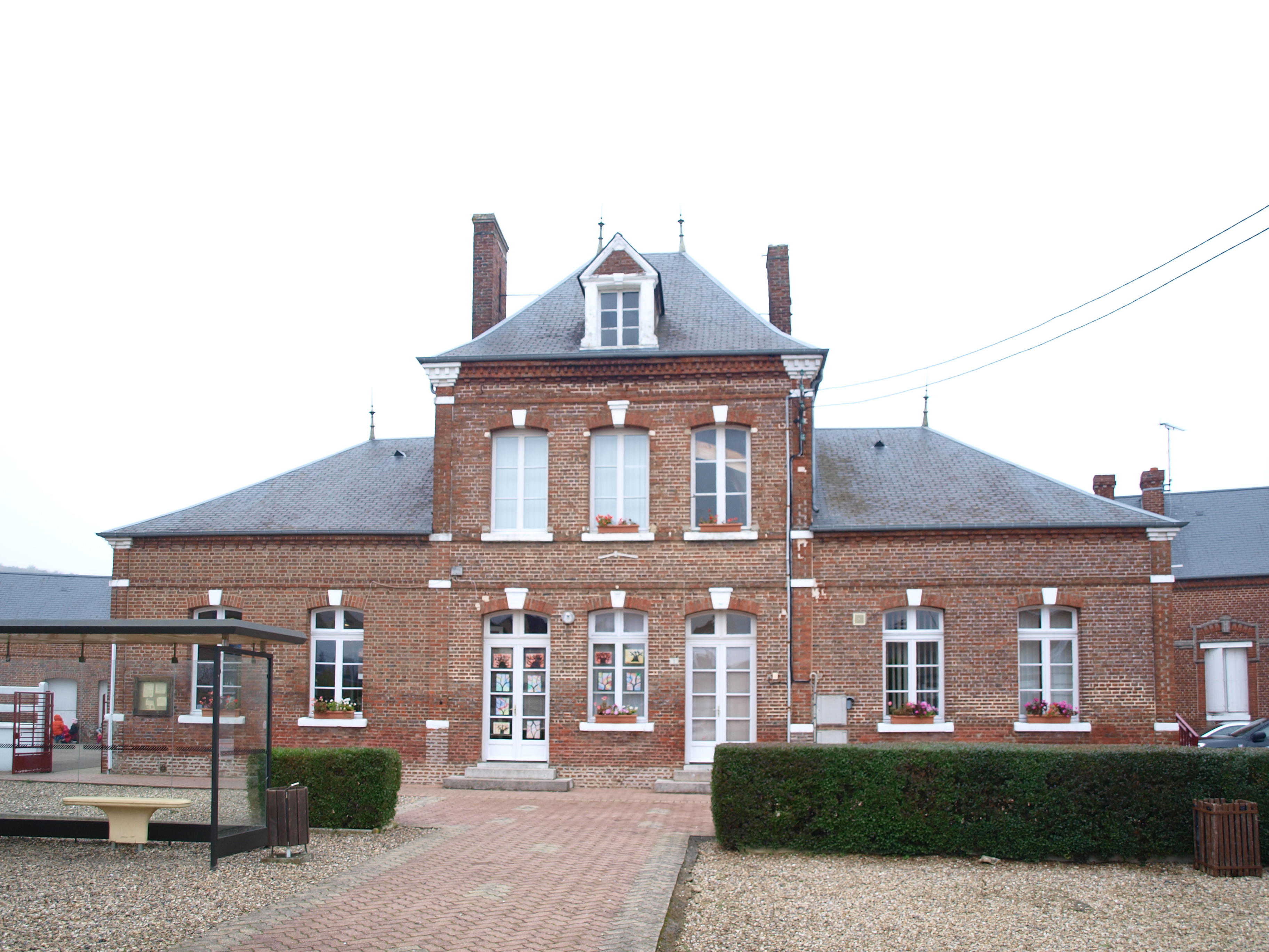 Vieux-Rouen-sur-Bresle ( Seine-Maritime, France) ; la mairie-école.